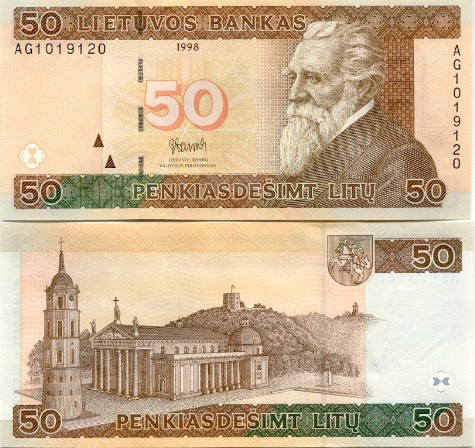 50 litu